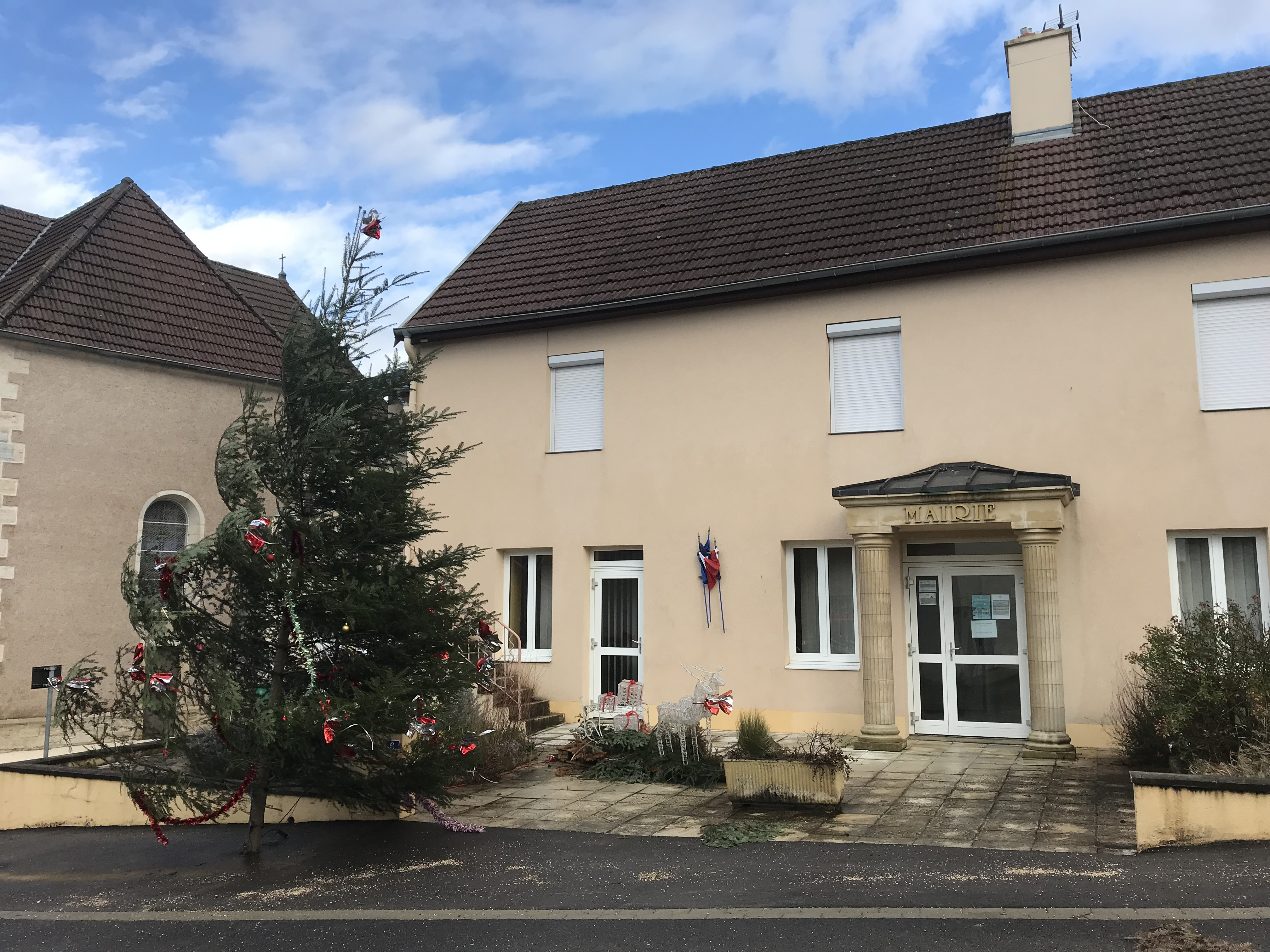 Image de Louvatange (Jura, France) en janvier 2018.